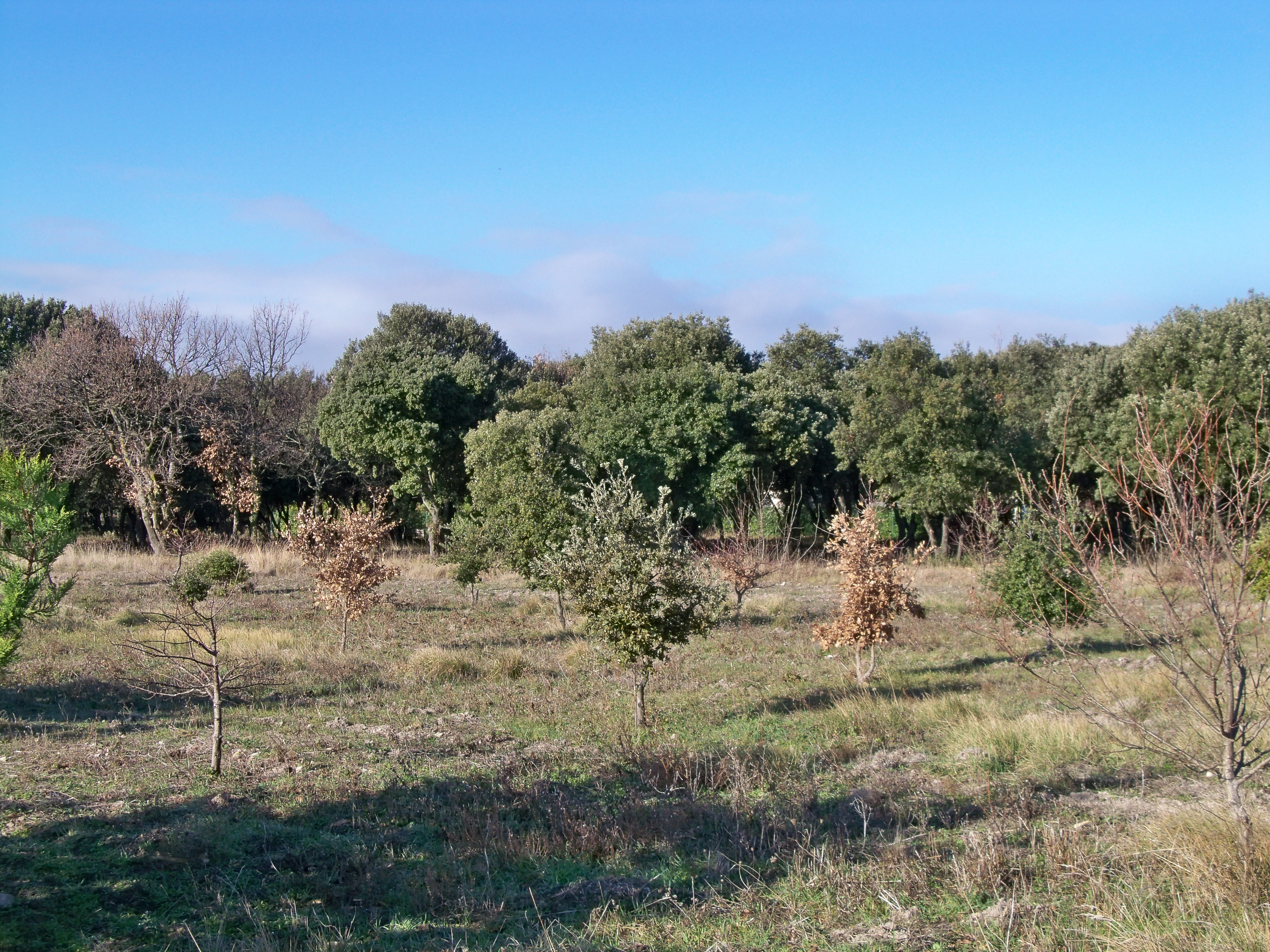 Truffières à plusieurs ages de vie